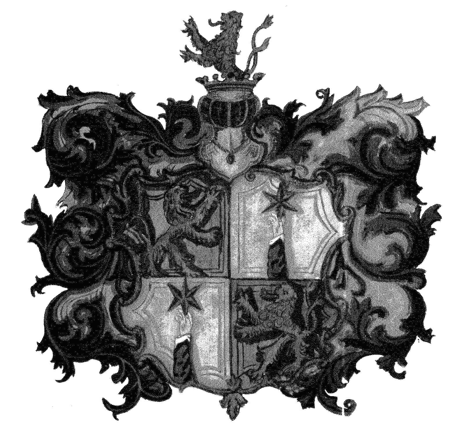 Wappen der Familie Inama-Sternegg nach Wappenbrief zur Erhebung in den Reichsadelsstand von 1704.